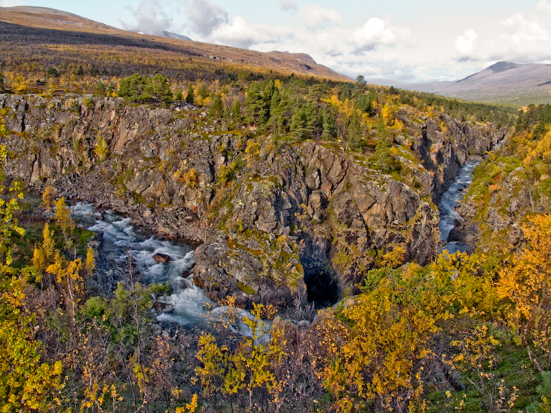 Övre Dividal Anjajohka